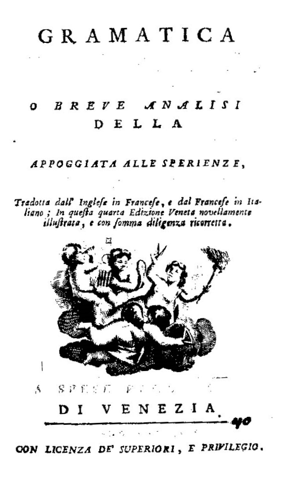 Frontespizio